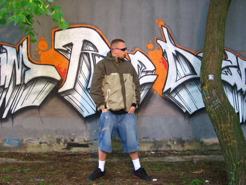 Borixon na planie klipu "Zacieram ręce dzieciak"